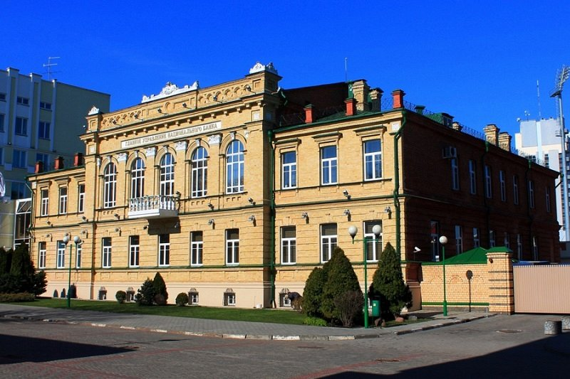 Маскоўскі міжнародны банк